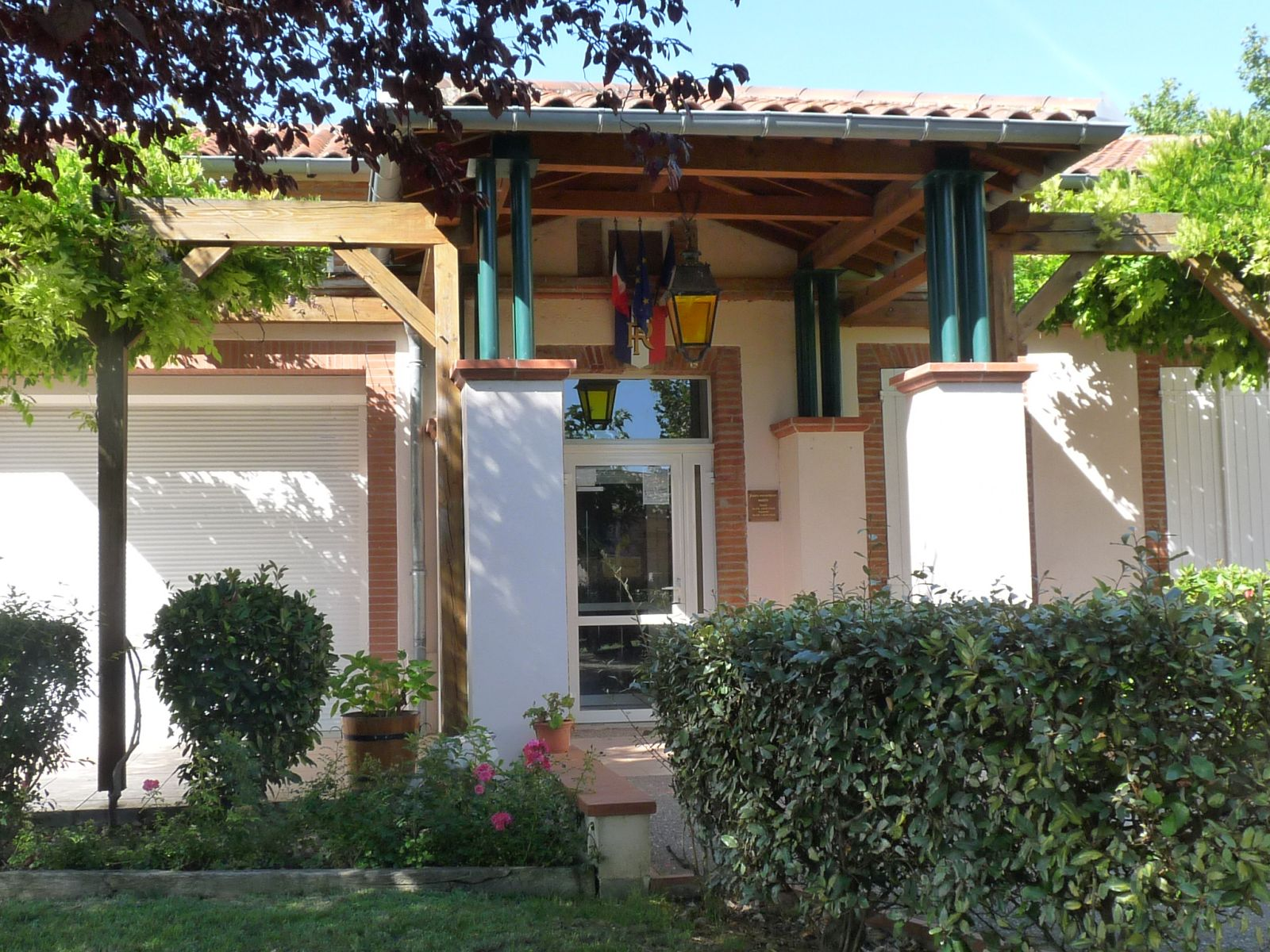 Mairie de Gibel, Haute-Garonne, France